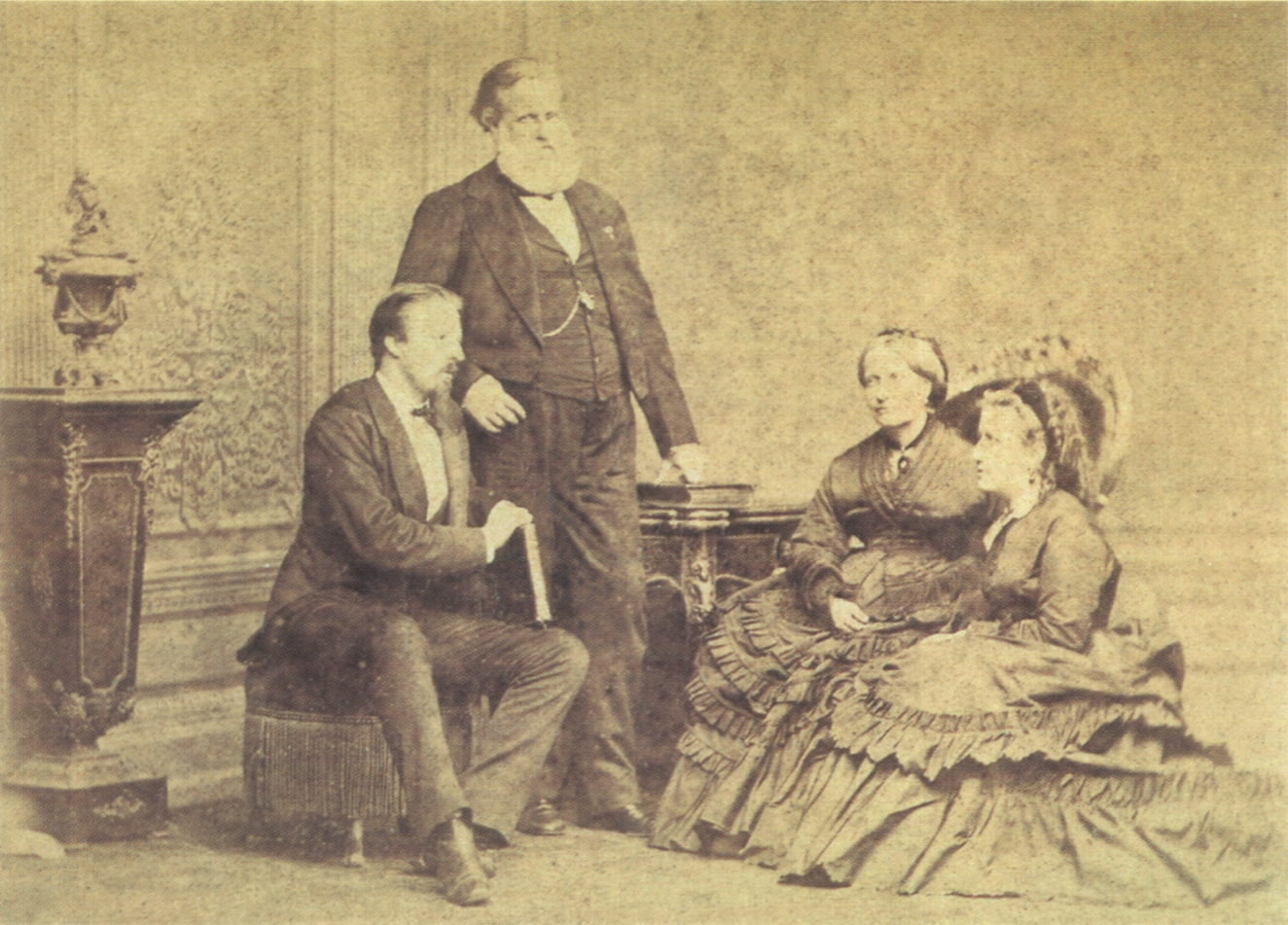 Dom Pedro II, a imperatriz Thereza Christina Maria, a princesa Isabel e o conde d'Eu. Rio de Janeiro. Albúmen, carte cabinet, 10 x 13,9 cm.